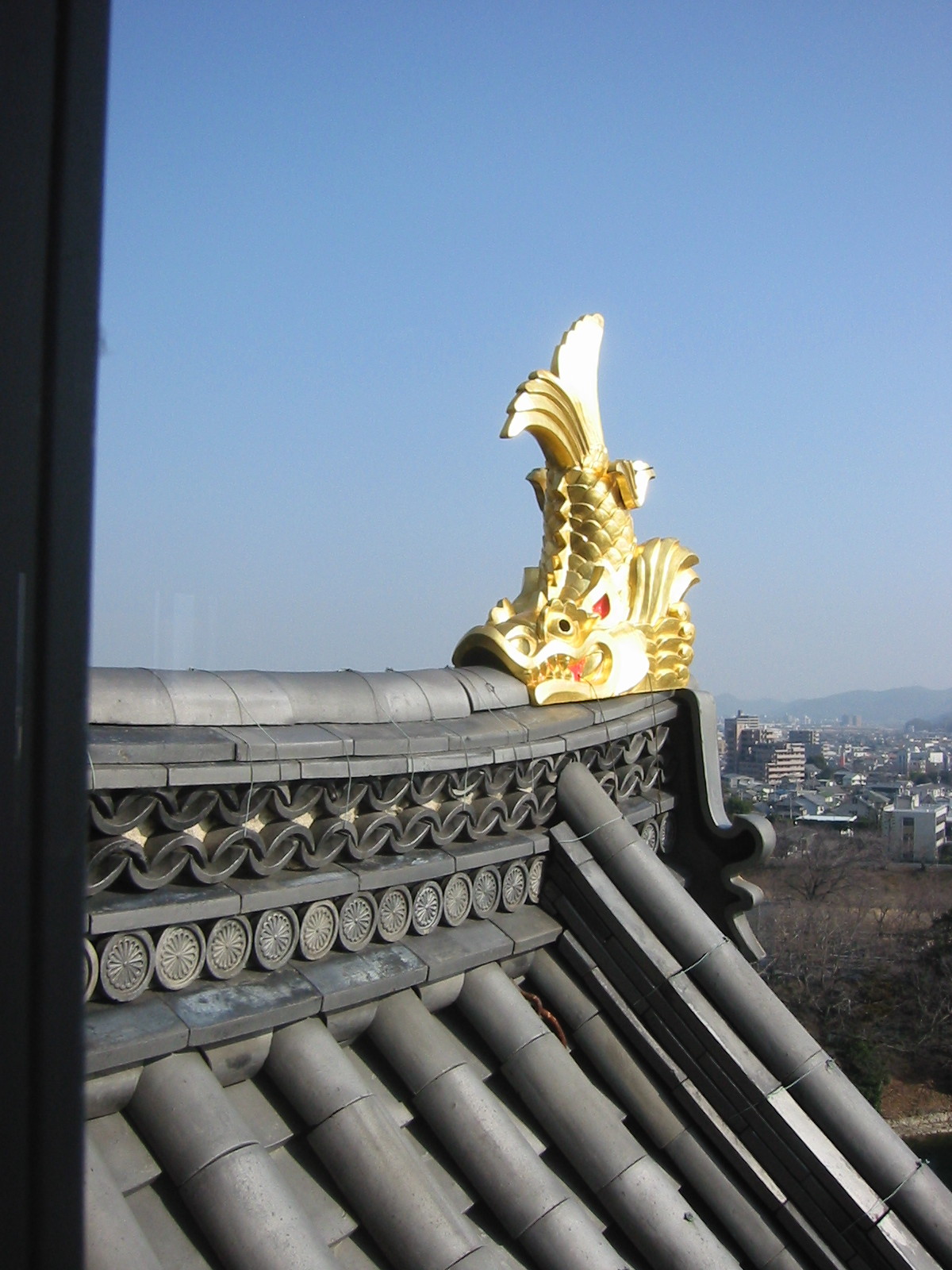 岡山城金鯱